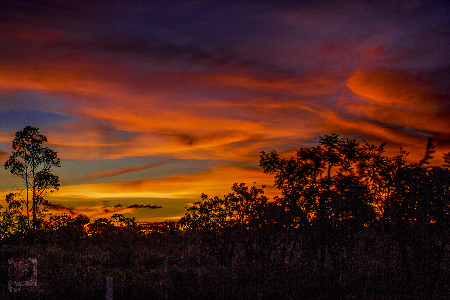 Parque nacional de Brasilia, fotografia tirada a tarde